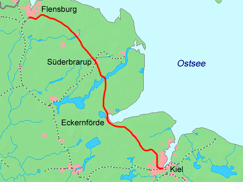 Karte der Bahnstrecke Kiel–Flensburg